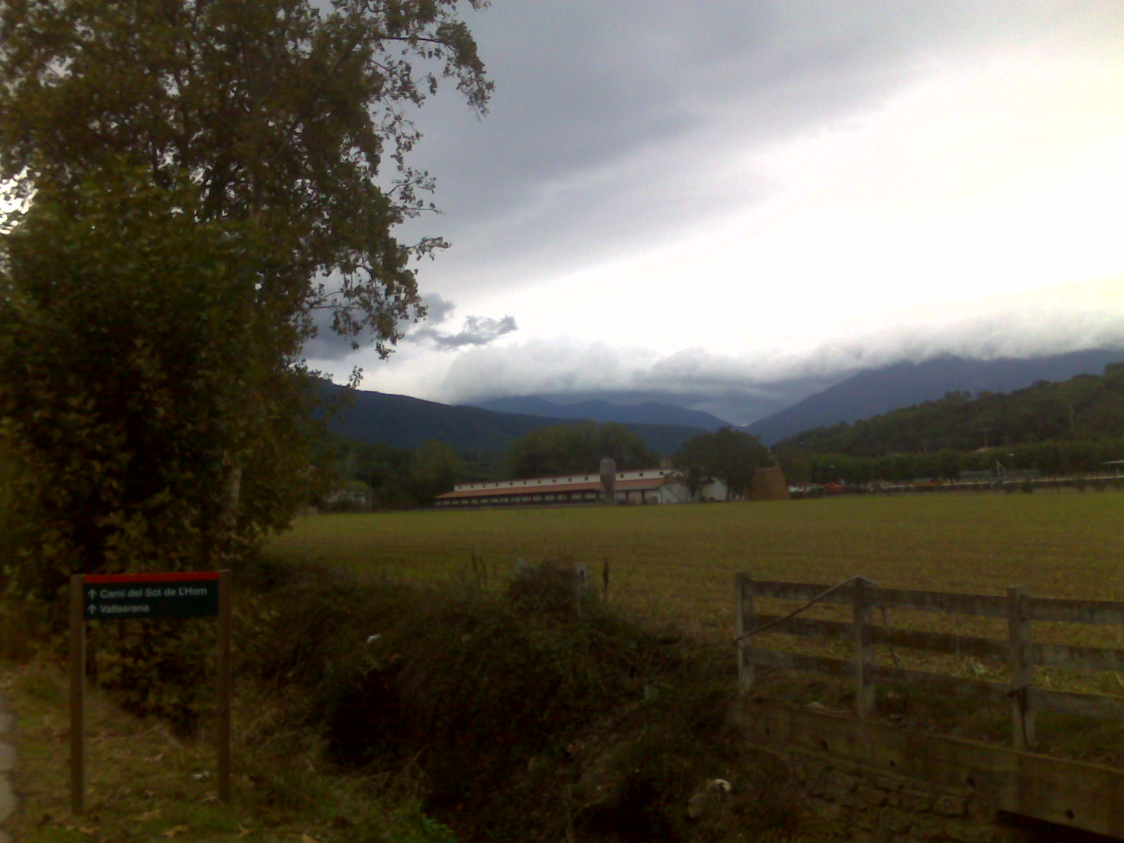 Veïnat de Vallserena (Sant Pere de Vilamajor)